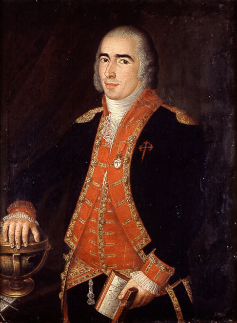 Retrato del marino español Francisco Alsedo y Bustamante (1758-1805), que alcanzó el grado de capitán de navío de la Real Armada Española y murió en octubre de 1805 en la batalla de Trafalgar. El retratado aparece de pie y de medio cuerpo y con su mano derecha apoyada sobre un globo terráqueo. Con la mano izquierda sostiene un libro de Euclides, viste uniforme pequeño de teniente de navío y luce la venera y la cruz de caballero de la Orden de Santiago.